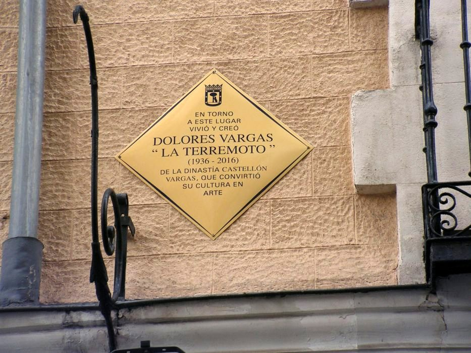 La artista gitana Dolores Vargas “La Terremoto” ya tiene una placa en la plaza de Santa Ana